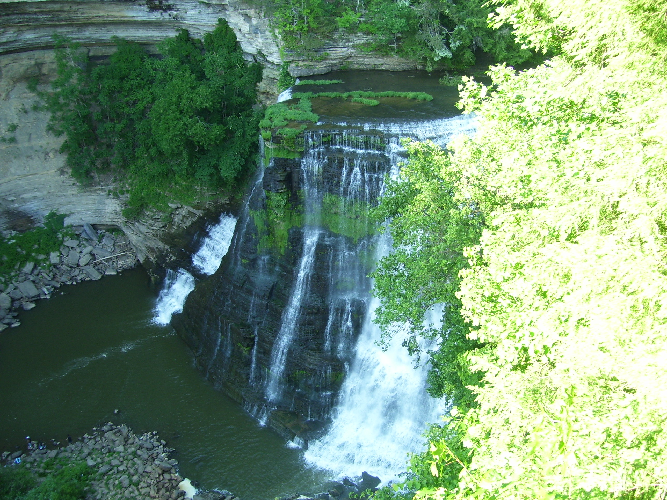 Burgess Falls